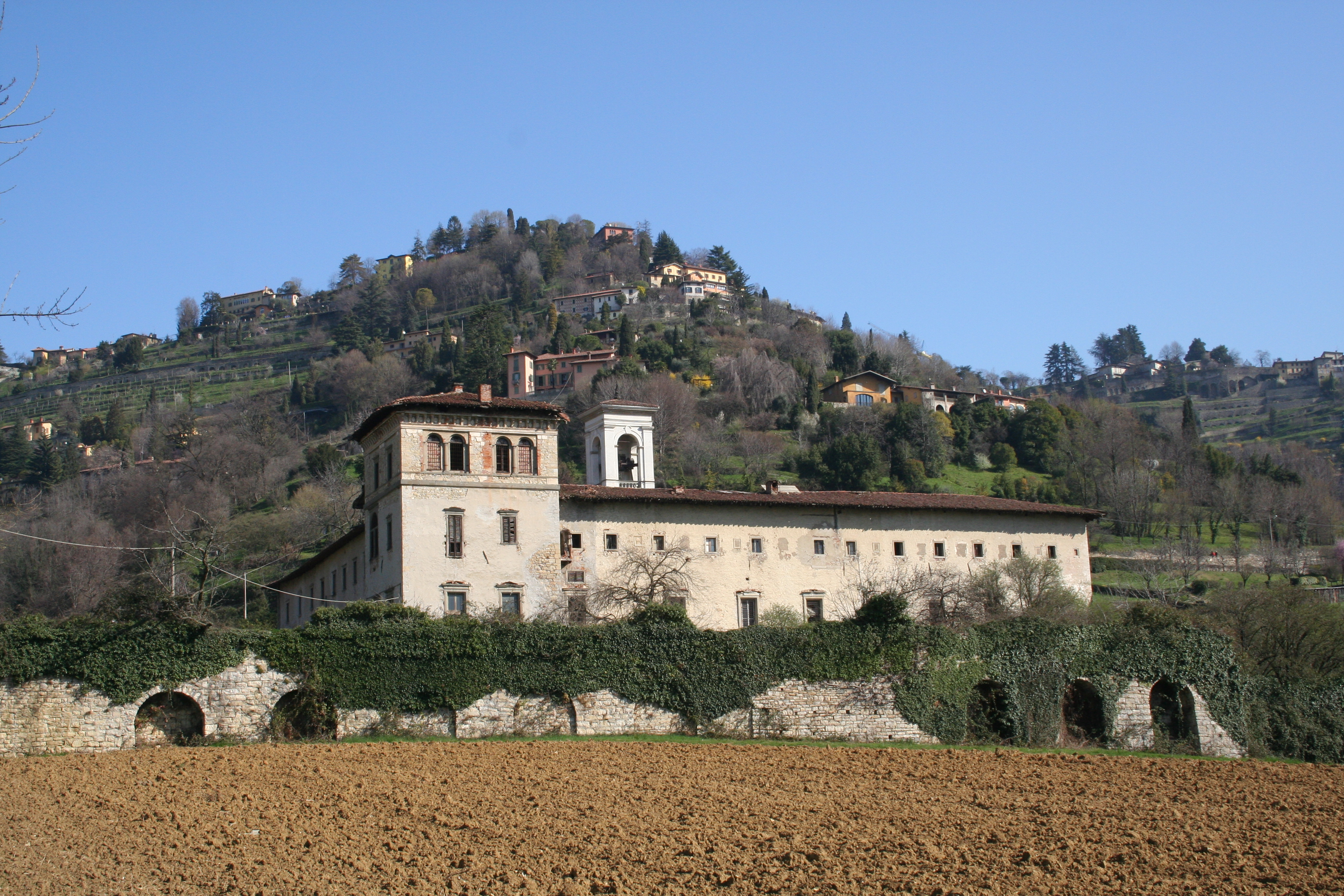 Monastero di Astino